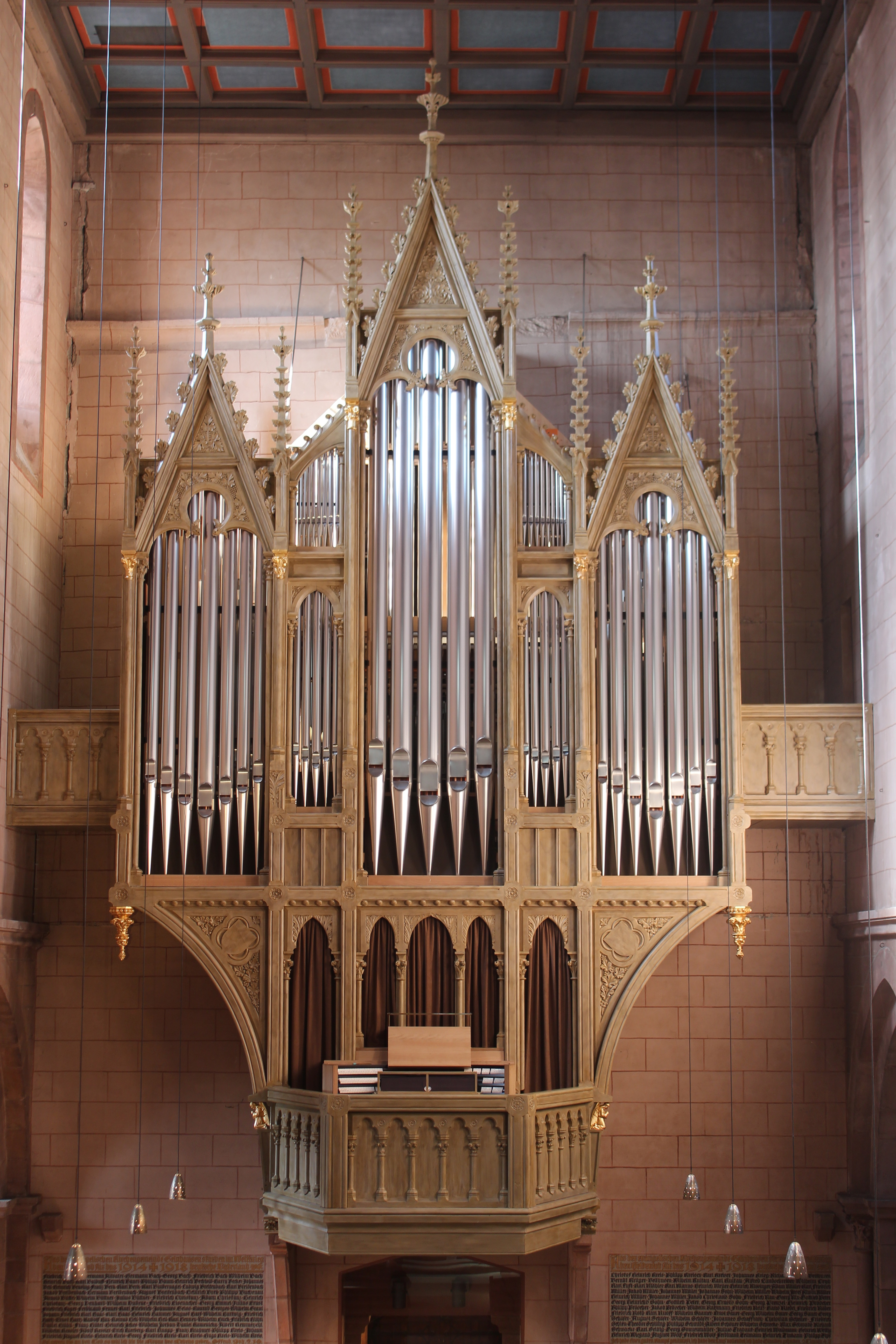 Prospekt der Winterhalter-Orgel der Marienkirche zu Gelnhausen, Zustand seit 2018. Der historische Prospekt von Wilhelm August Ratzmann (1876 bzw. 1871 oder 1878/79) wurde beibehalten und im Mittelteil der ursprünglichen Gestalt angenähert. - Vom Lettner aus gesehen